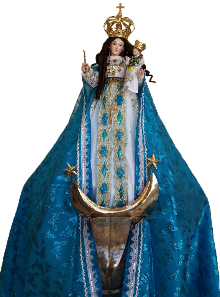 Imagen de la Virgen María en la advocación a nuestra señora de la natividad de Chilla, representación gráfica esculpida en el siglo XIX, a la cual, el Papa Paulo VI en 1969, declara a la Virgen María bajo el título de Natividad De Chilla, Patrona de la Diócesis de El Oro.